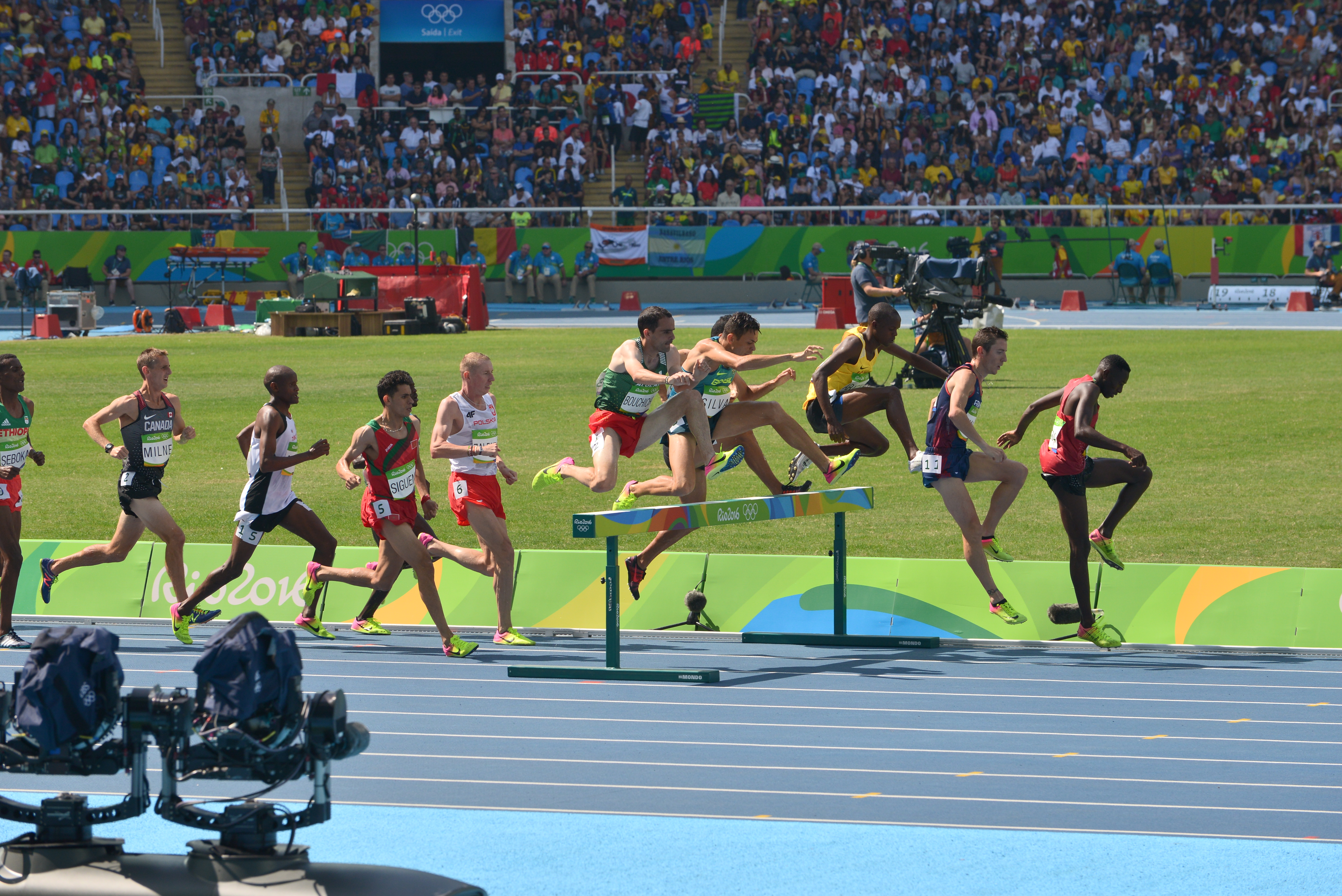 Course du 3000m steeple homme aux JO 2016 de Rio